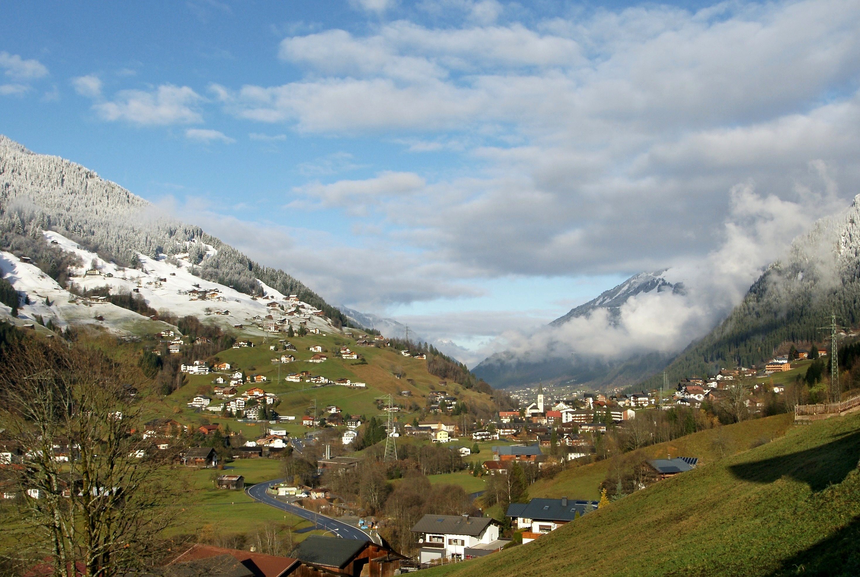 Vom Ortsteil Rifa auf Gaschurn. Links Gundalatscherberg , darüber erstreckt sich das Skigebiet Silvretta Nova. Weiter links im Schnee die Valisera und Versettla. Rechts in Nebelschwaden gehüllt das Skigebit Skigebit Hochjoch Schruns im Montafon.